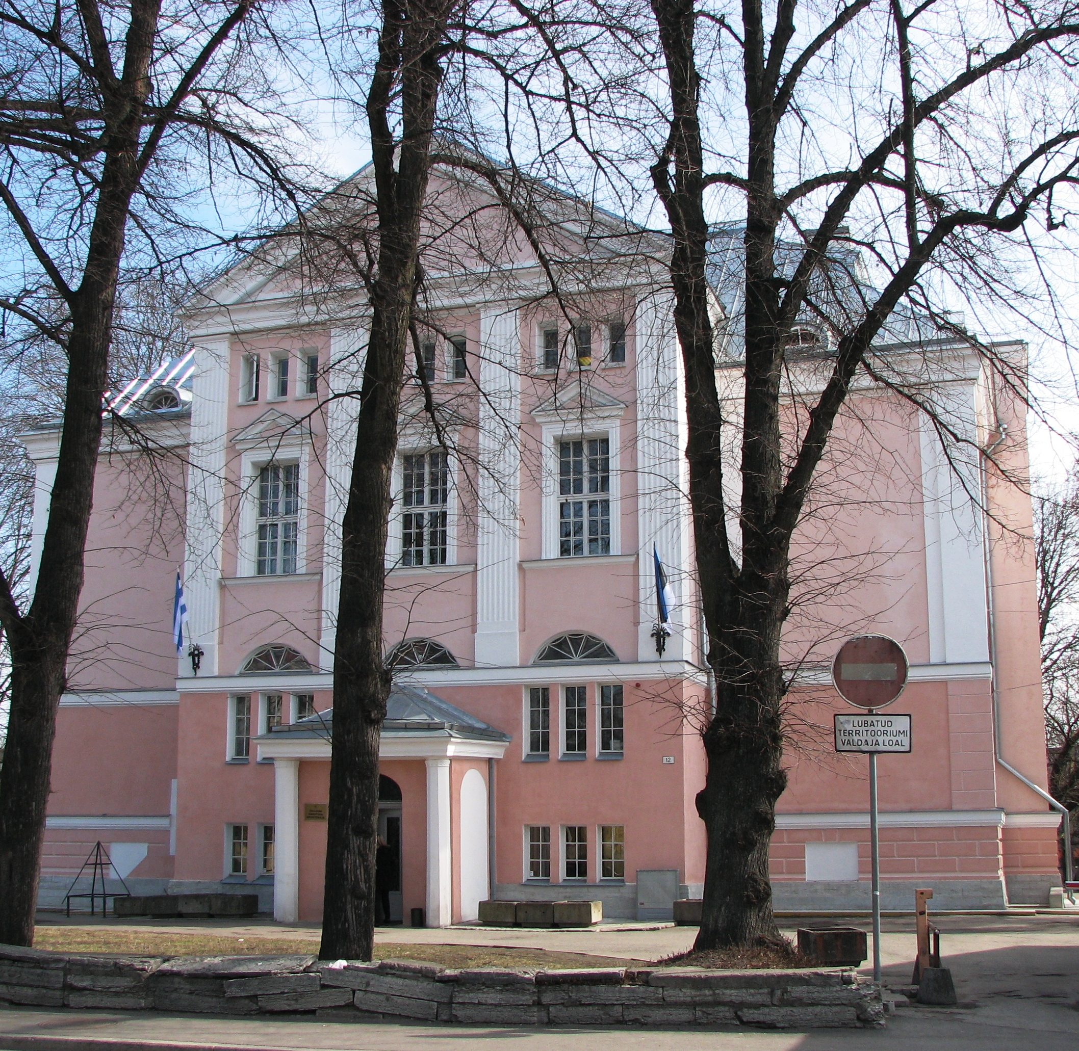 Tallinna Kanutiaia Noortemaja, Aia 12, 10111 Tallinn